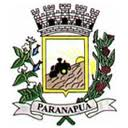 Brasão da cidade de Paranapuã, SP